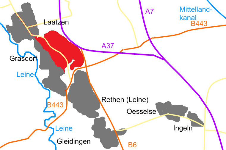 Karte von Laatzen-Mitte als Stadtteil von Laatzen. Basiert auf existierender Karte mit public domain.